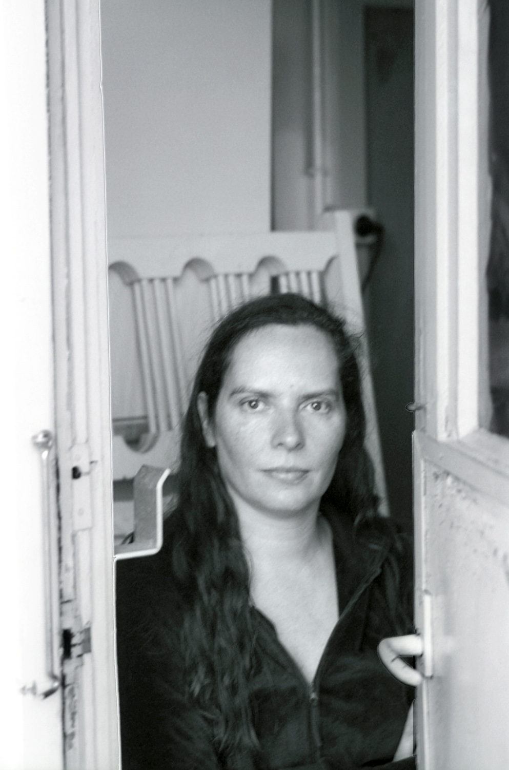 Corinne Kruger